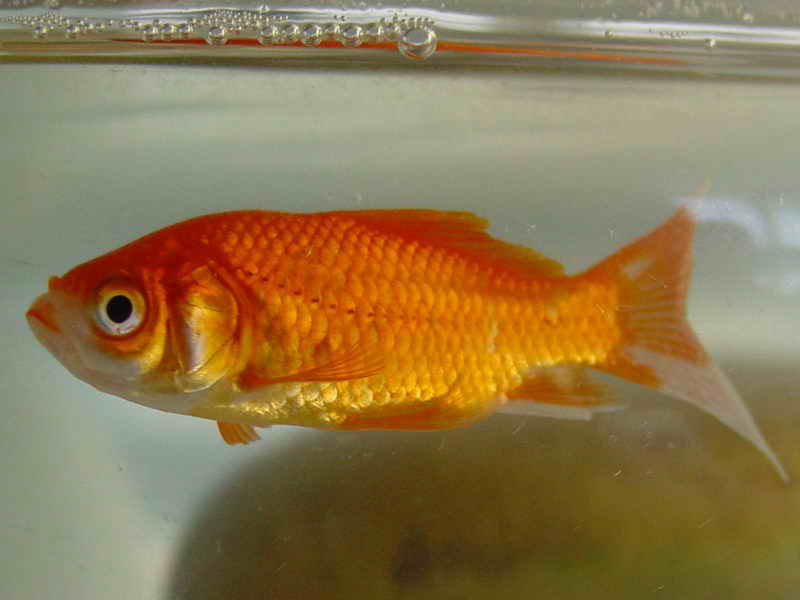 Foto tirada cunha Nikon E8800